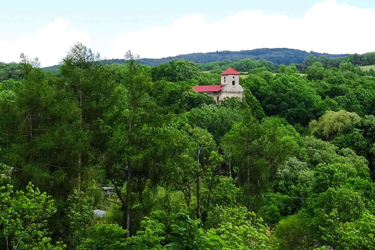 Svatobor, část obce Doupovské Hradiště, kostel Nanebevzetí Panny Marie, okres Karlovy Vary